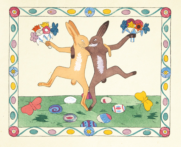 Bild aus Konrad Friedrich Edmund von Freyhold: Osterbuch. (Deckeltitel “Hasenbuch”). Verse von Ch. Morgenstern. Mit koloriertem Vorsatzpapier, koloriertem Titel und 16 kolorierten Tafeln. Berlin, B. Cassirer, 1908